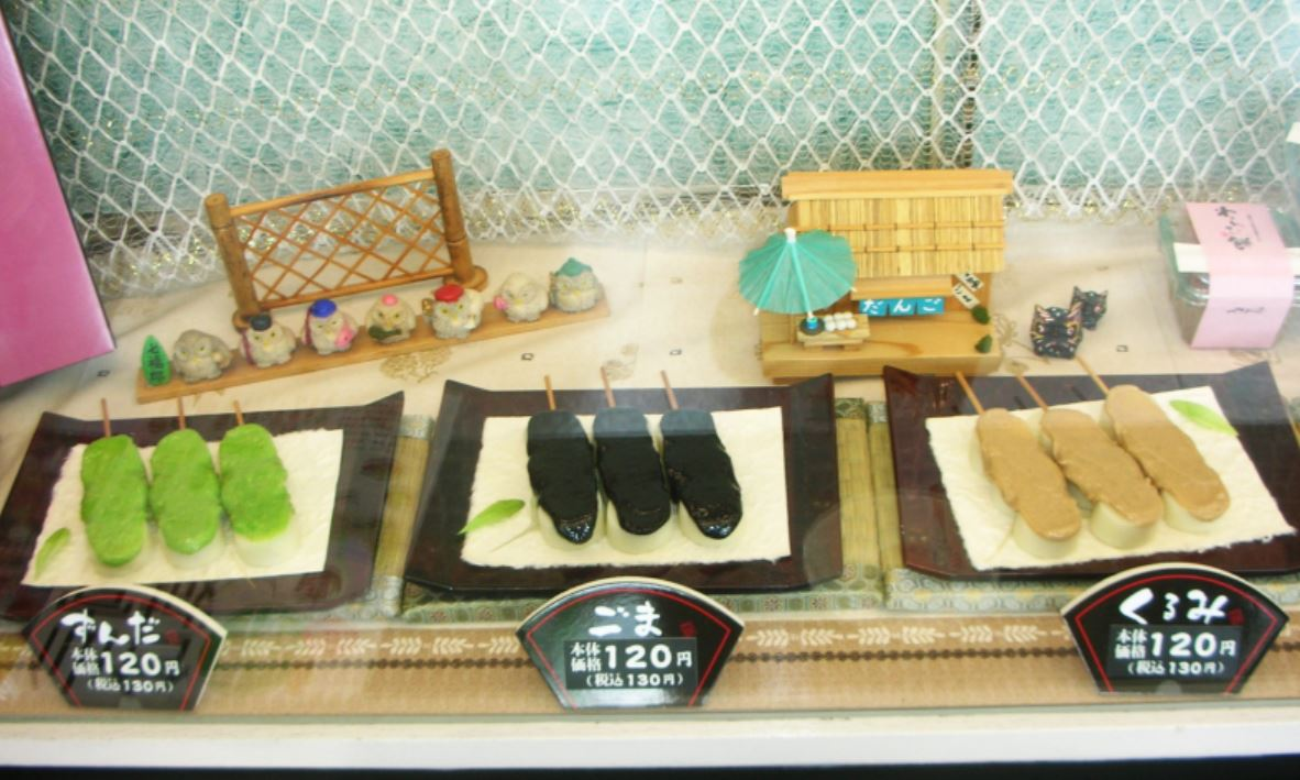 つつみ屋 ずんだごまくるみ